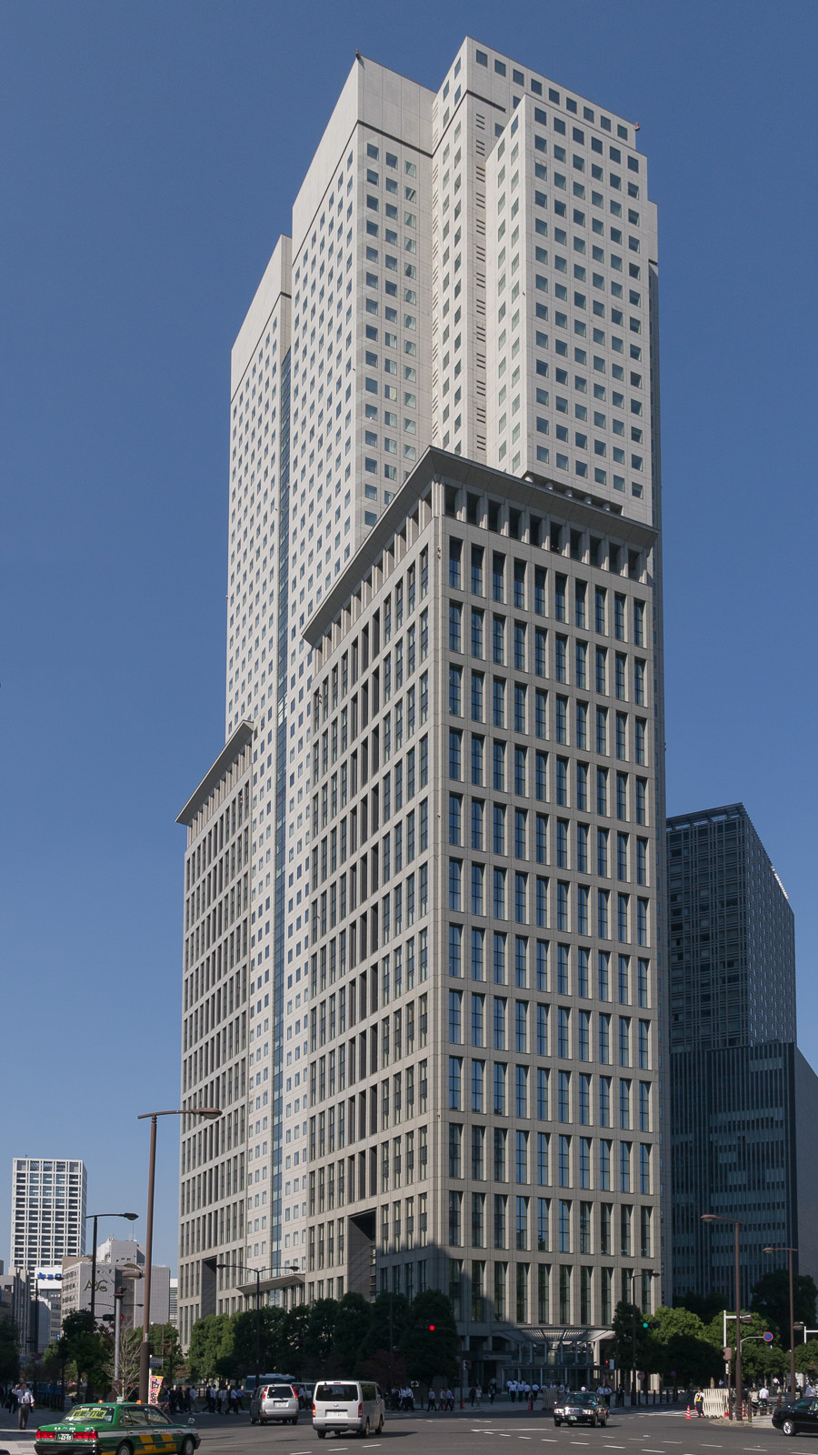 山王パークタワー、東京都千代田区永田町2丁目。